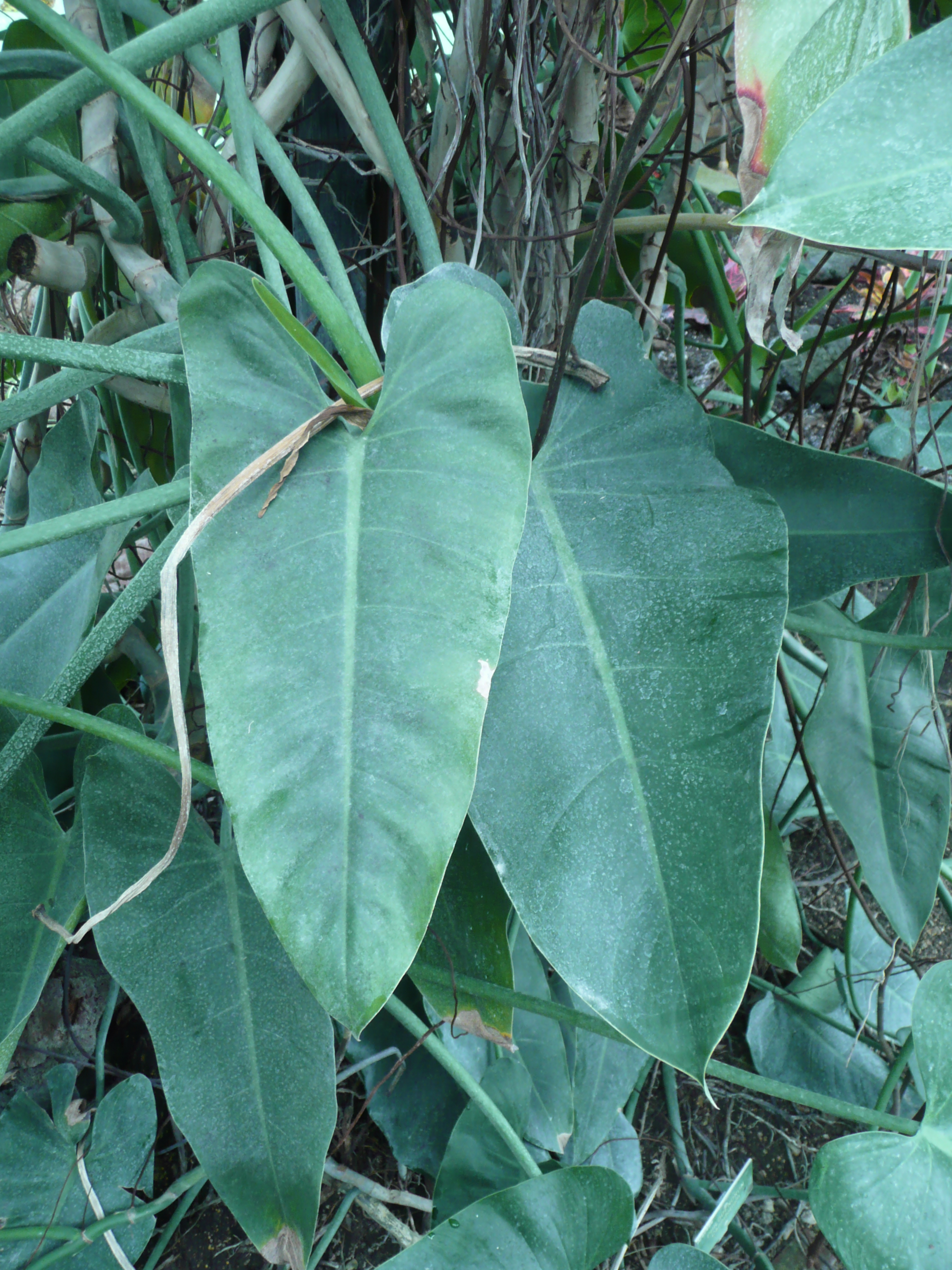 Philodendron cannifolium in Parc floral de Paris